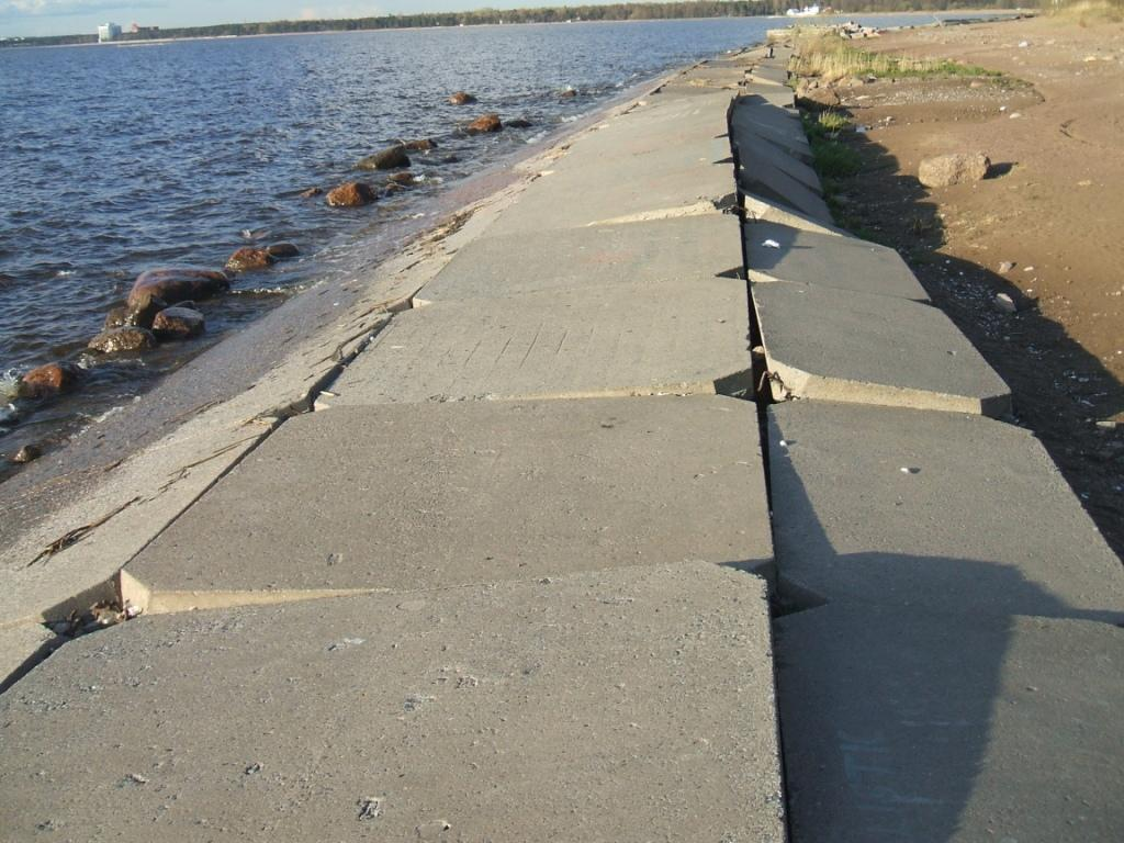 результат изменения берегов под волновым воздействием